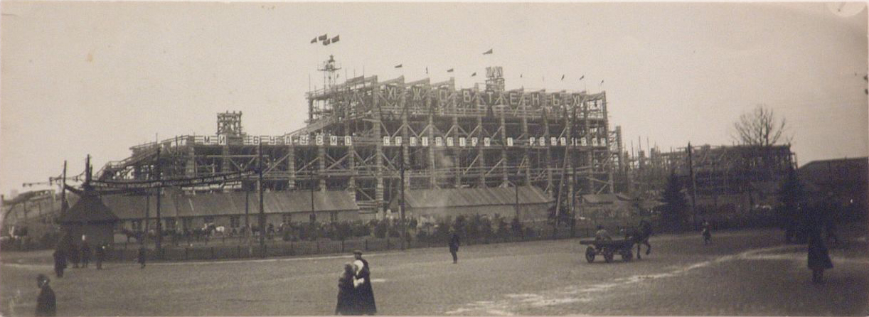 Строительство харьковского Почтамта